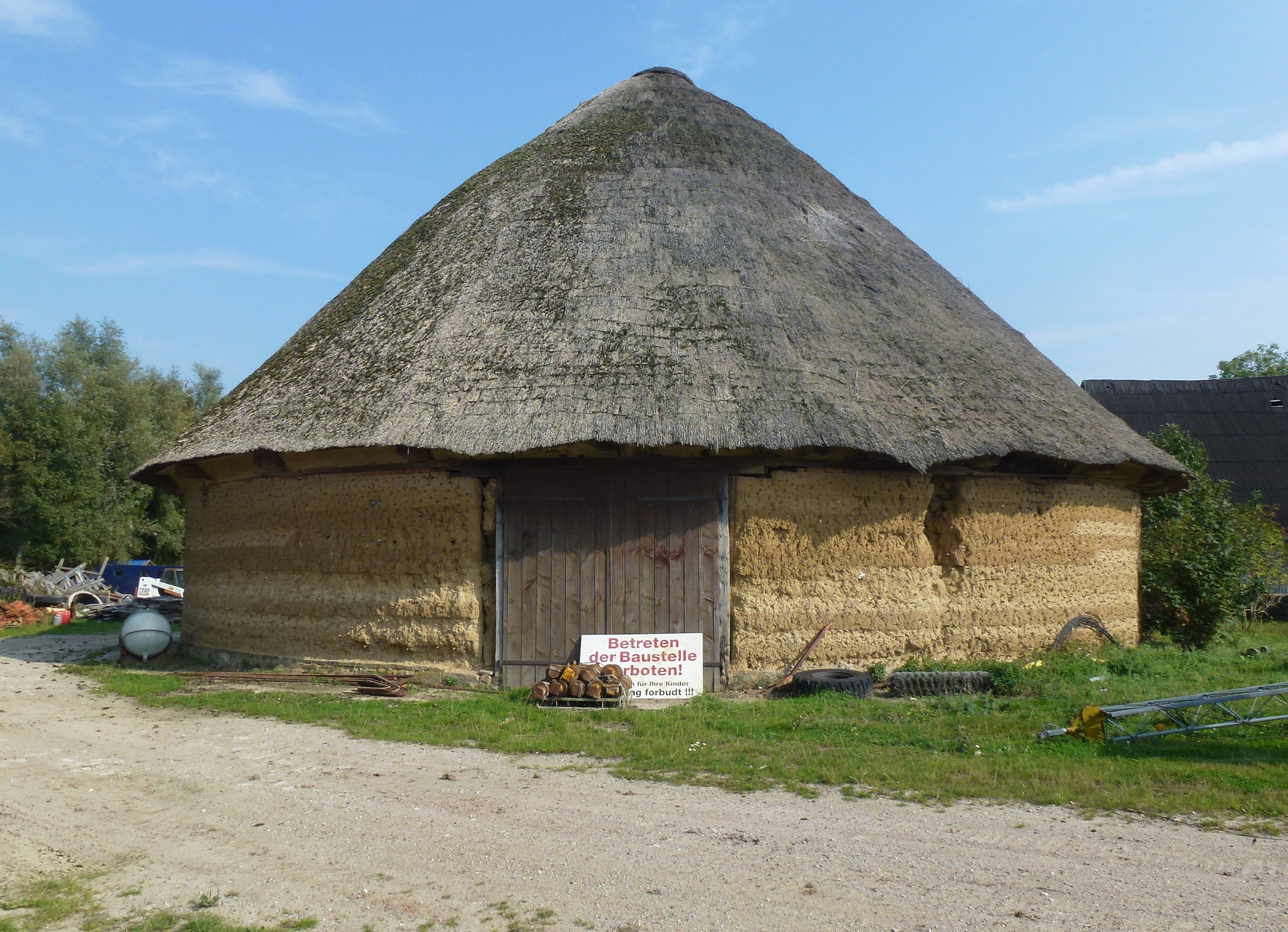 Die Rundscheune beim Gut Bollbrügge